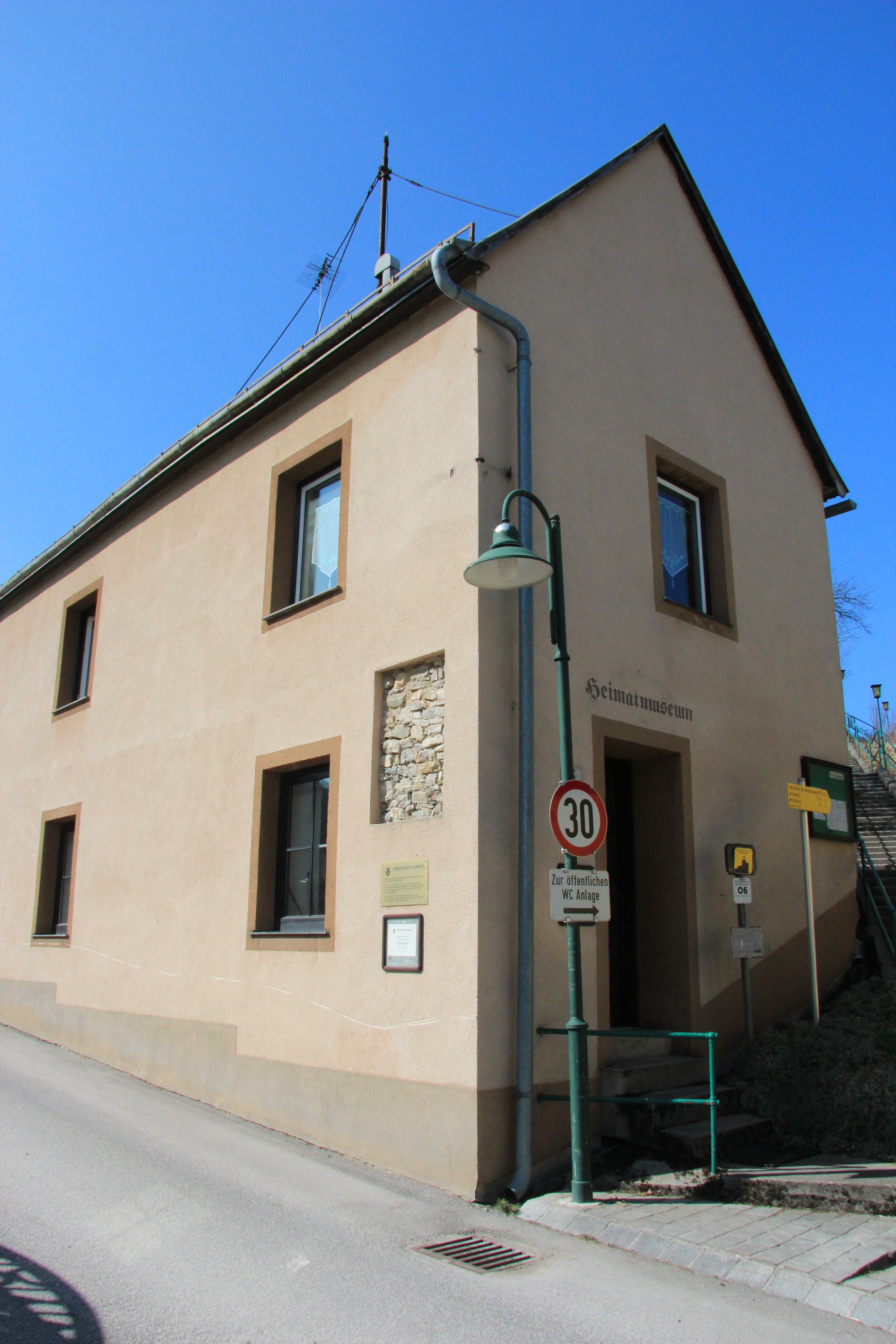 Heimatmuseum im früheren Gemeinde und Gendarmereihaus von Kaumberg